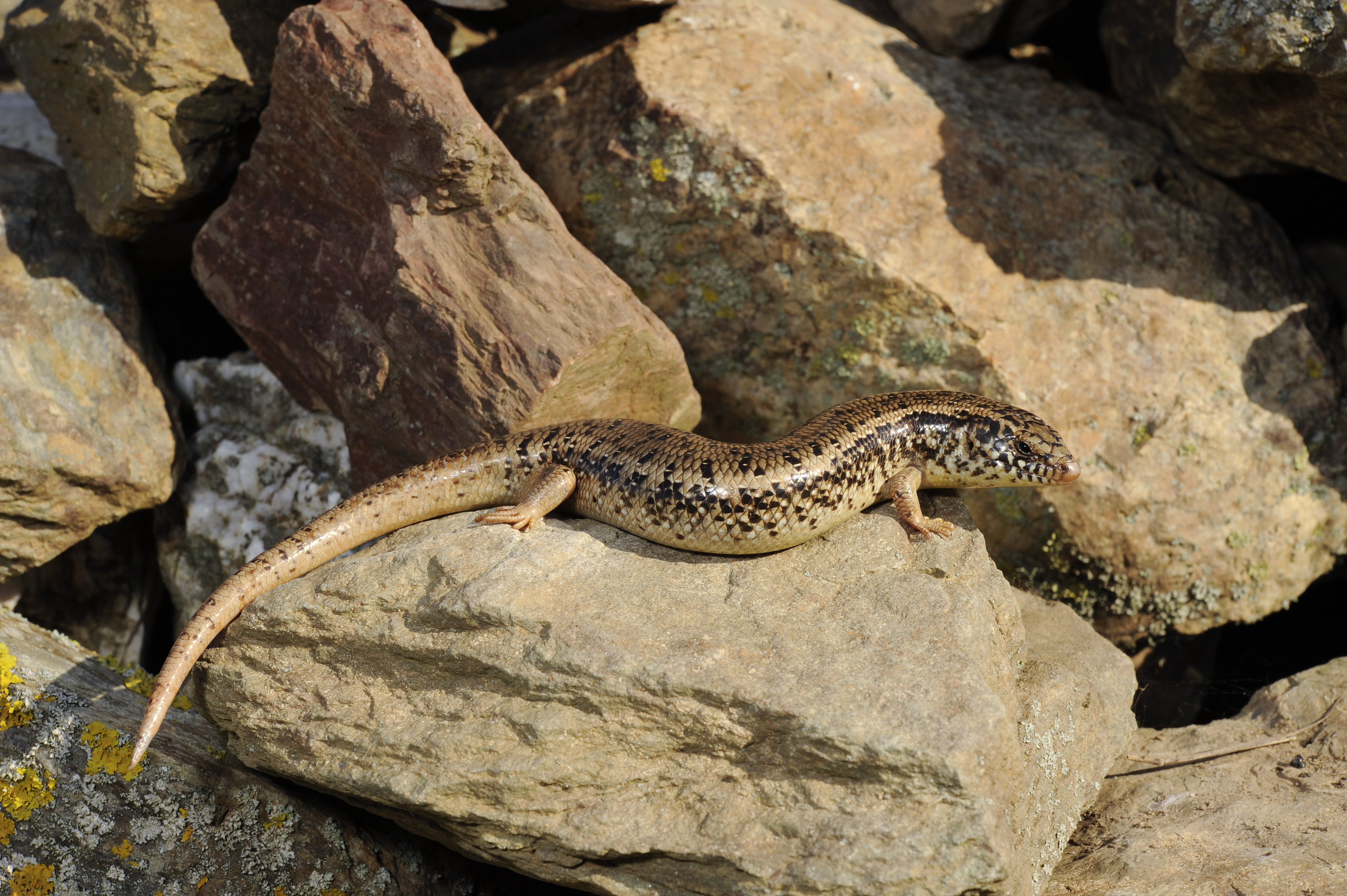 Gefleckter Walzenskink aus Sardinien/Italien